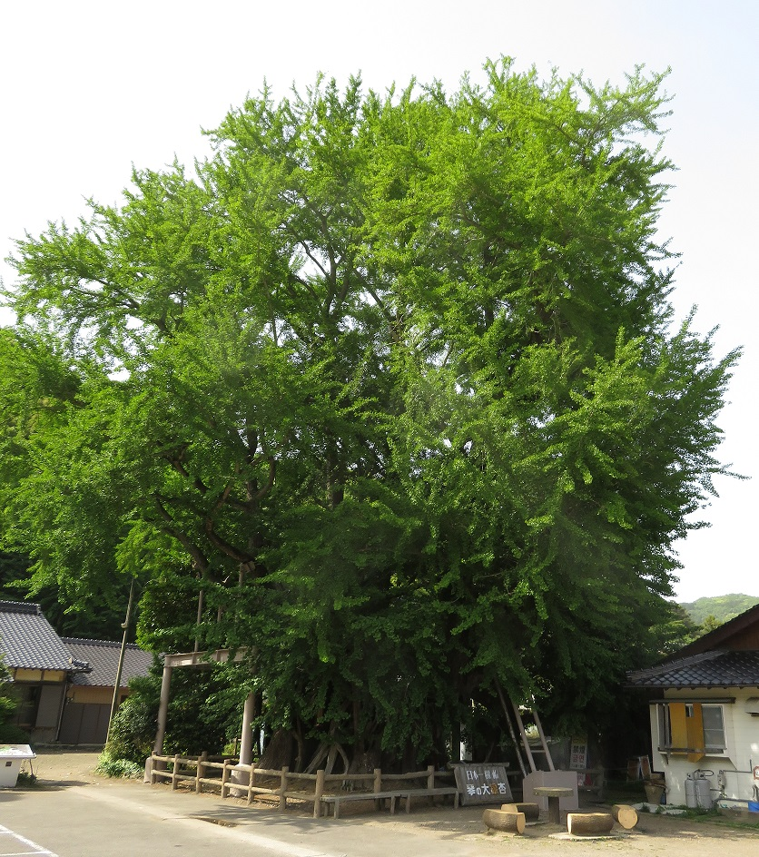 琴の大銀杏（対馬市上対馬町琴）